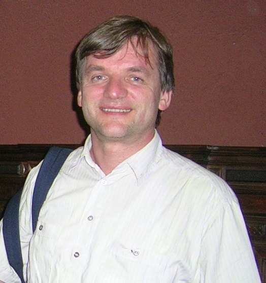 Prof. Dieter Hanelt